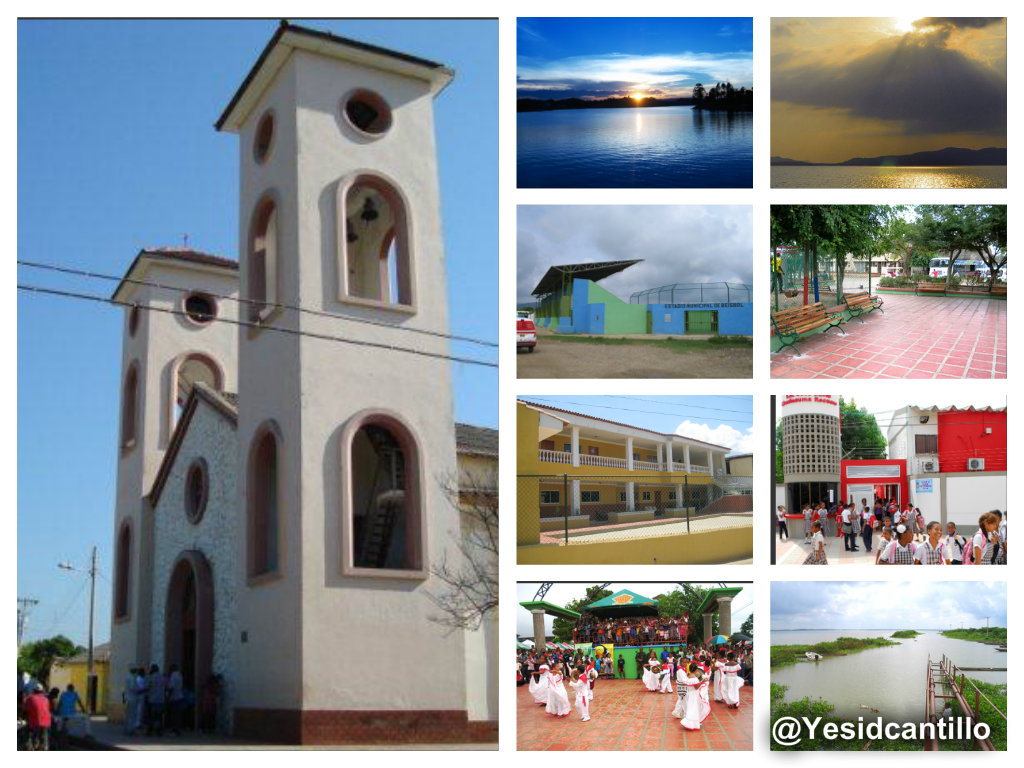 Multiimagen